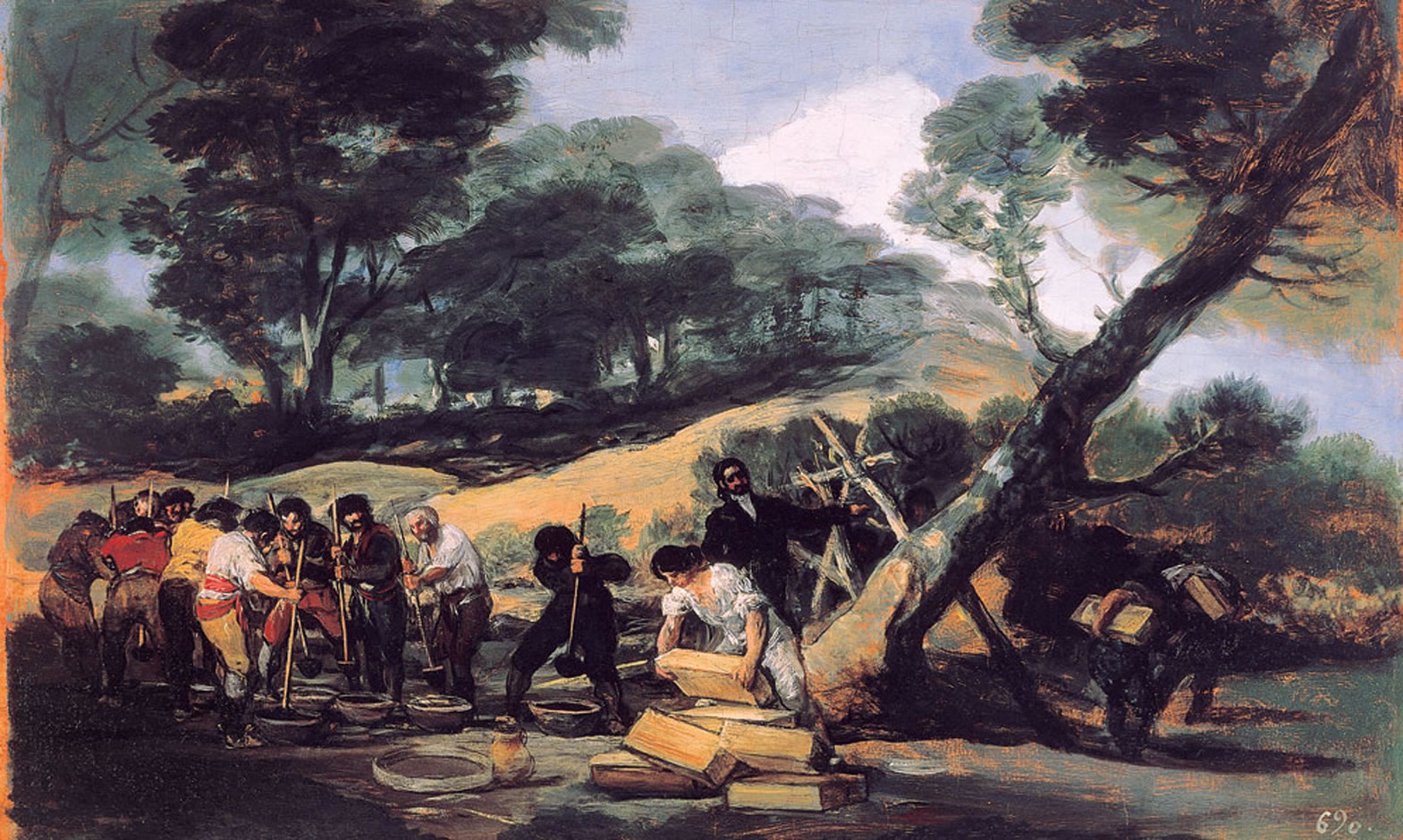 Sketch